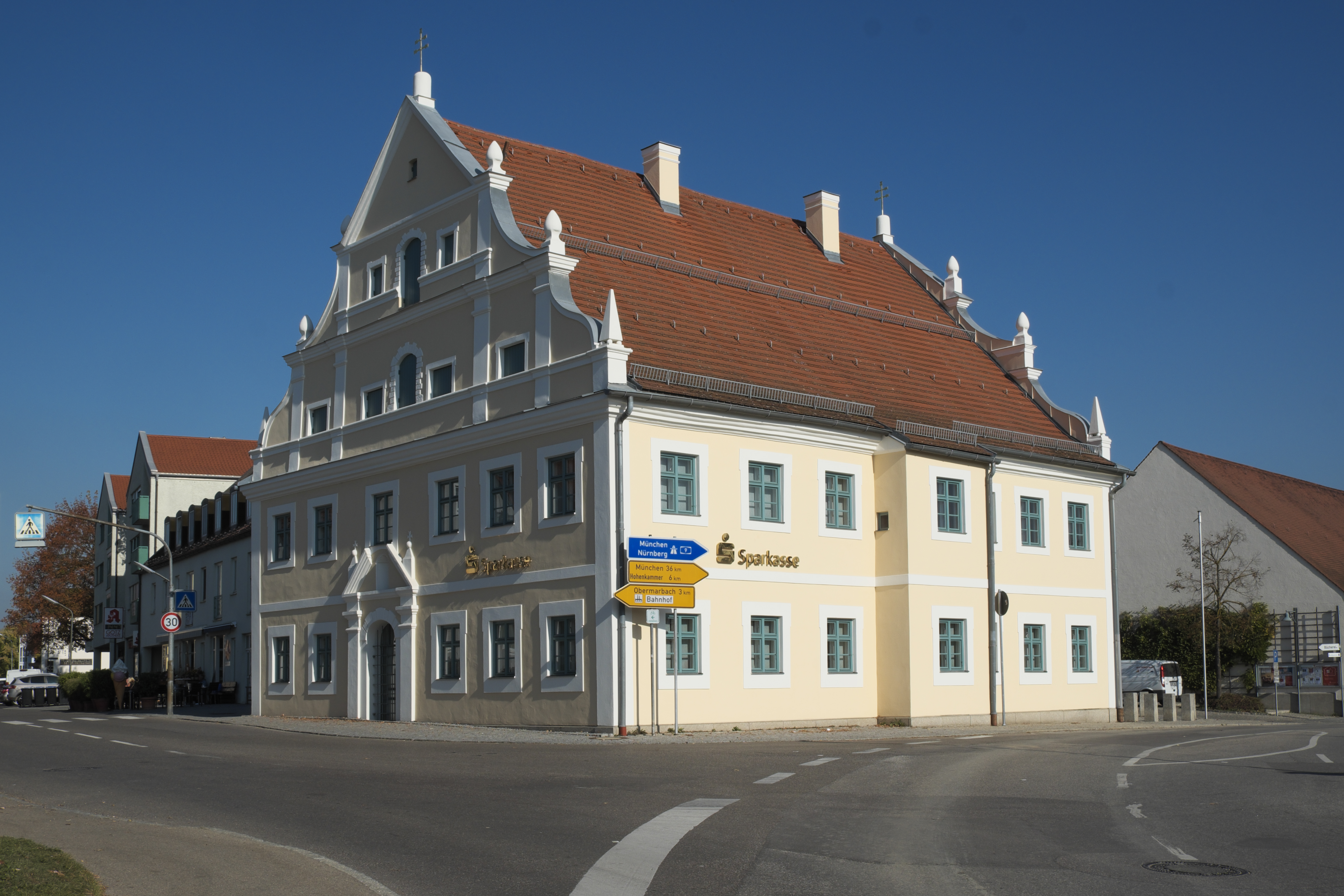 Ehemaliges Gasthaus am Marktplatz 1 in Petershausen im Landkreis Dachau (Bayern/Deutschland)